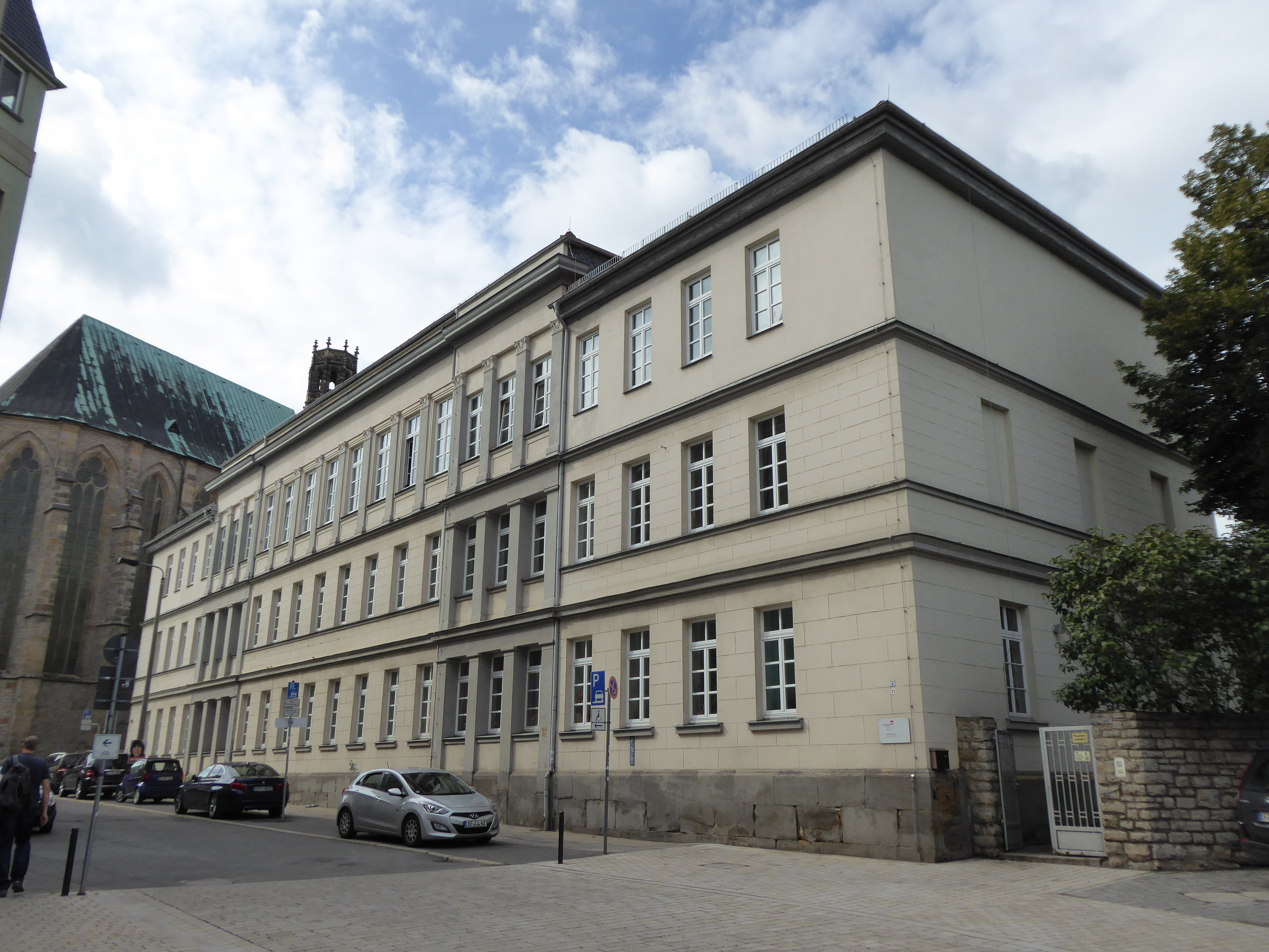 Denkmalgeschützte Barfüßerschule in der Barfüßerstraße 21 in Erfurt